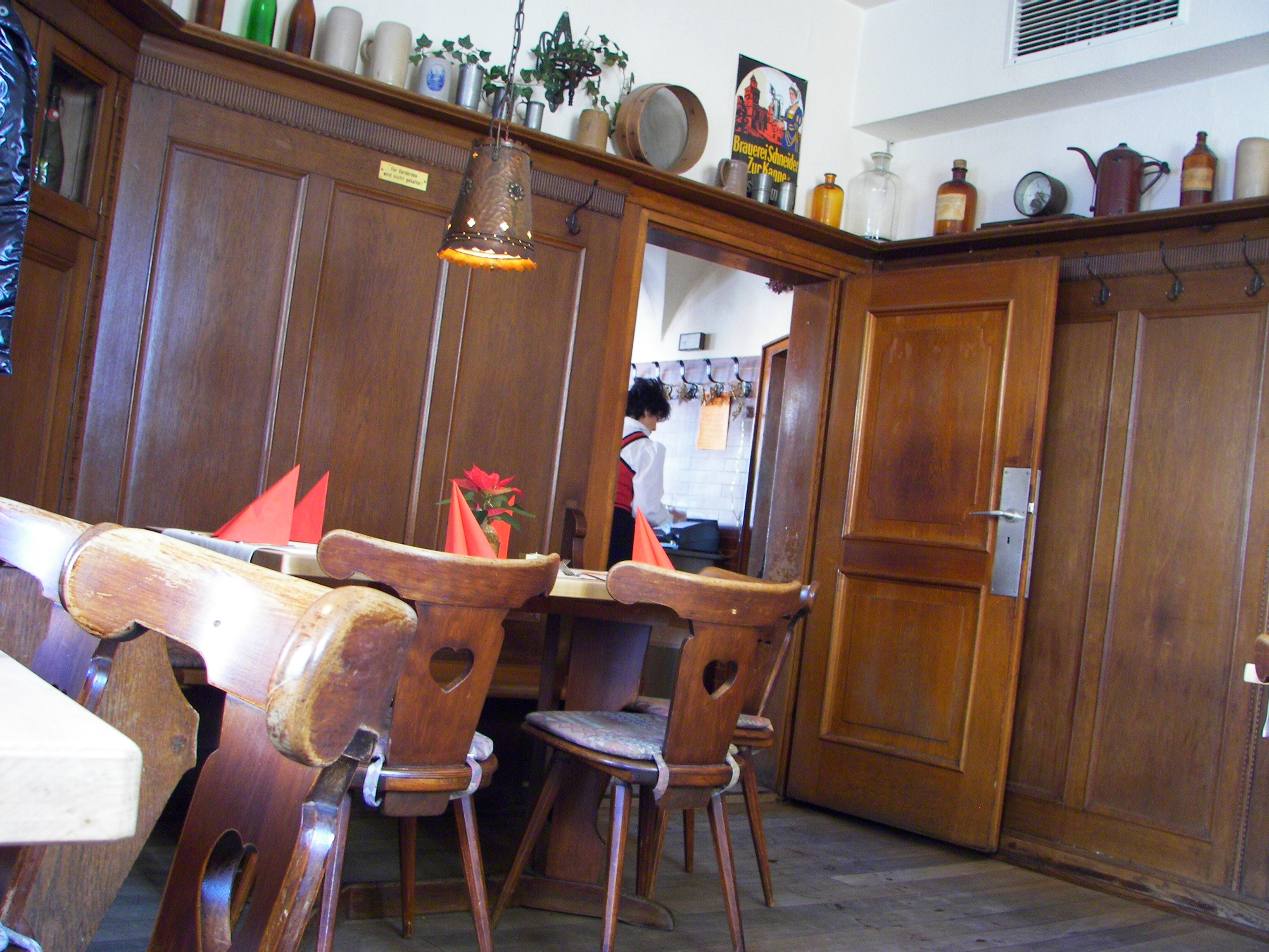 Gastraum im Gasthaus Zur Kanne, Bachgasse 15, Weißenburg in Bayern. Baudenkmal D-5-77-177-100